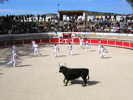 Die Tourneure bringen den Stier in Position Sonstiges: ...